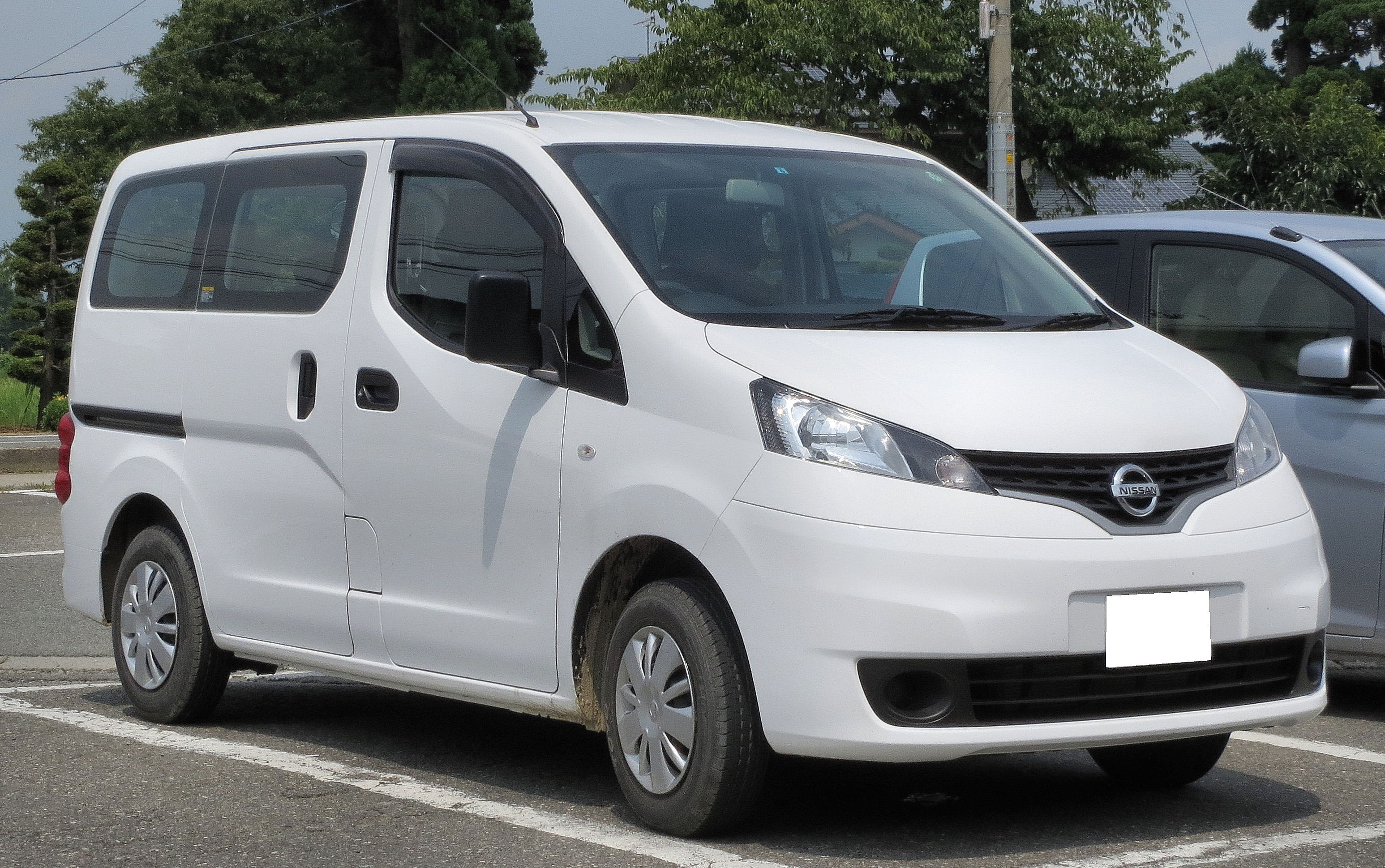 日産 NV200バネット バンVX